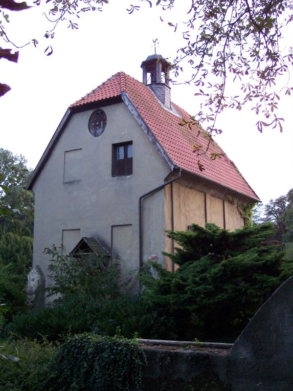 Haus Ermelinghoff, Kapelle, eigenes Bild